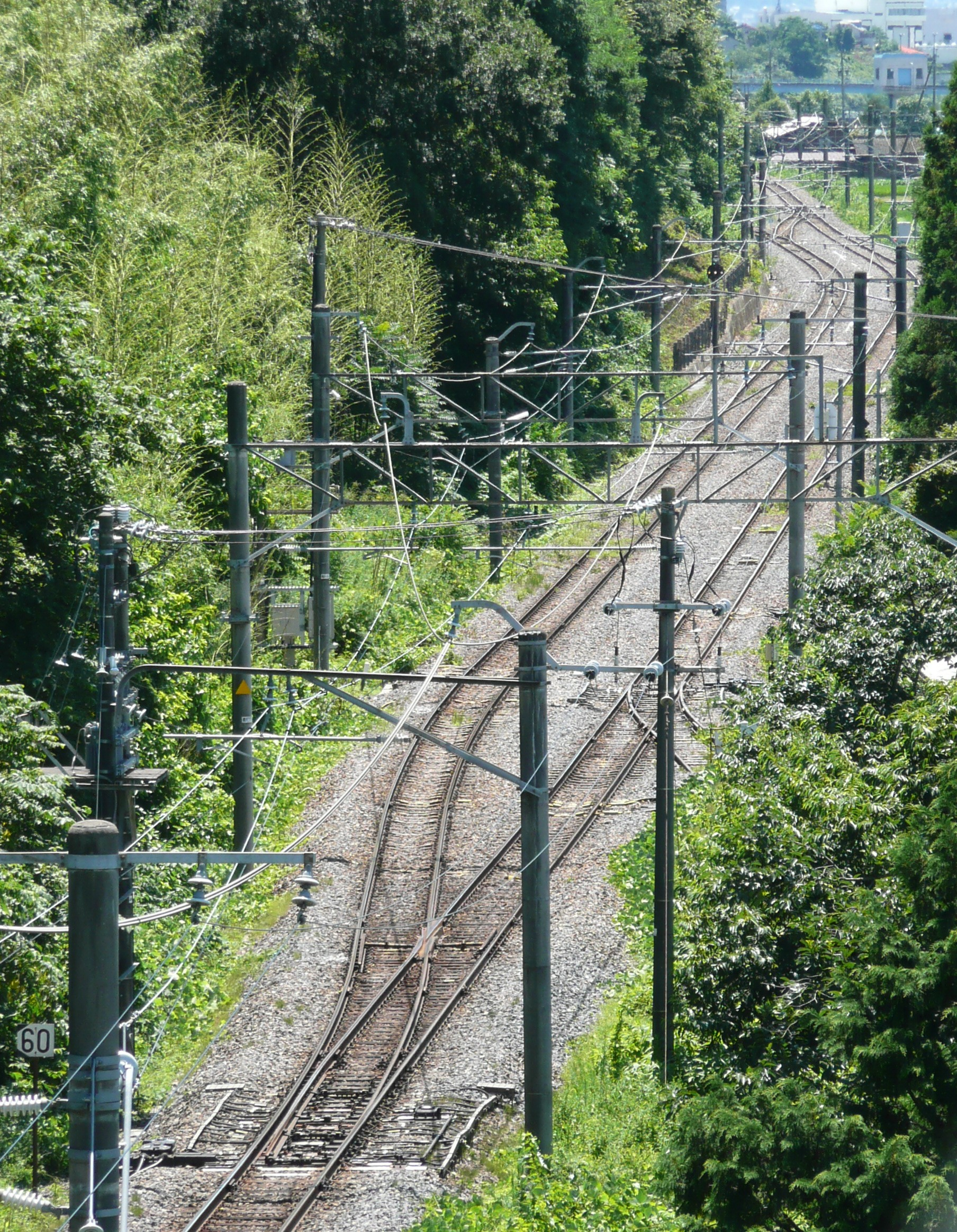 平瀬信号場（松本トンネル有料道路の跨線橋から撮影）